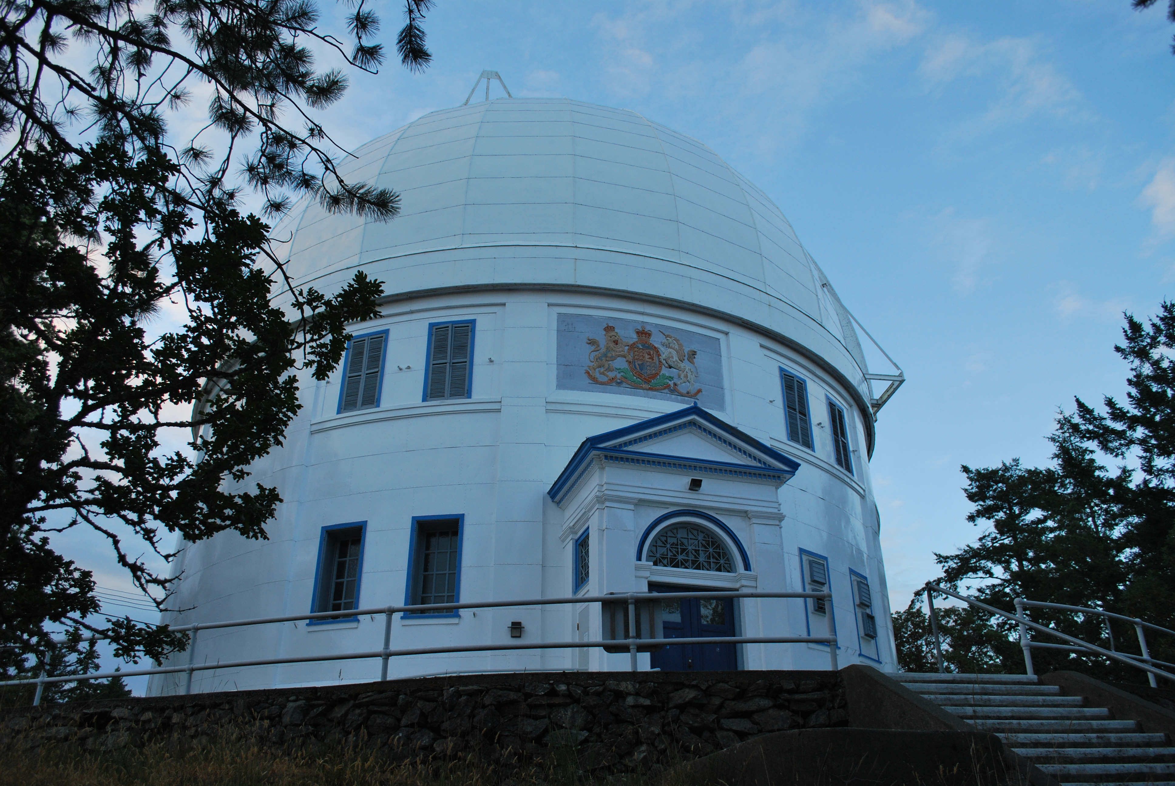 Observatoire fédéral d'astrophysique à Victoria (Colombie-Britannique) .